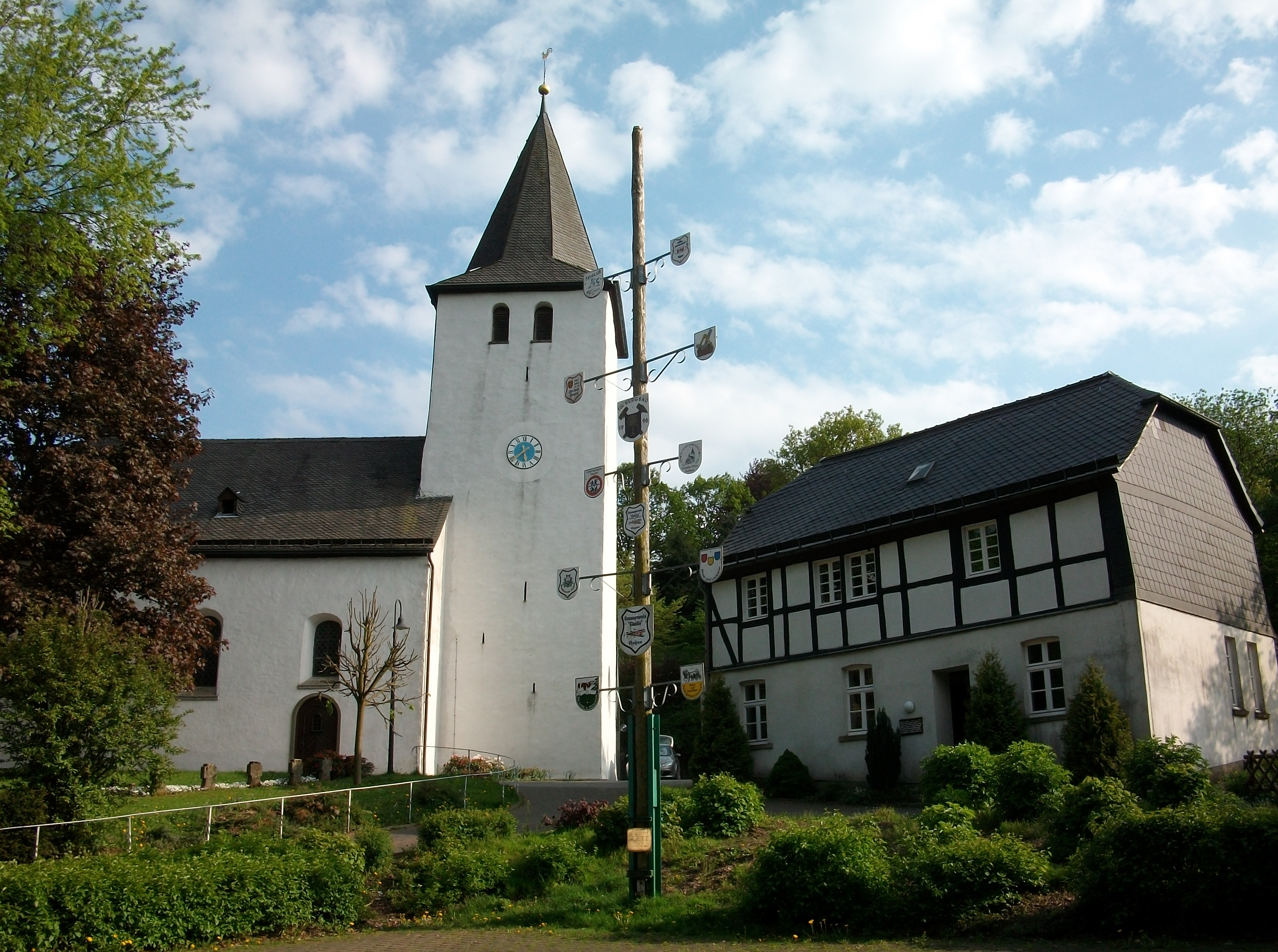 denkmalgeschützte alte Kirche in Sundern-Hagen (Germany).